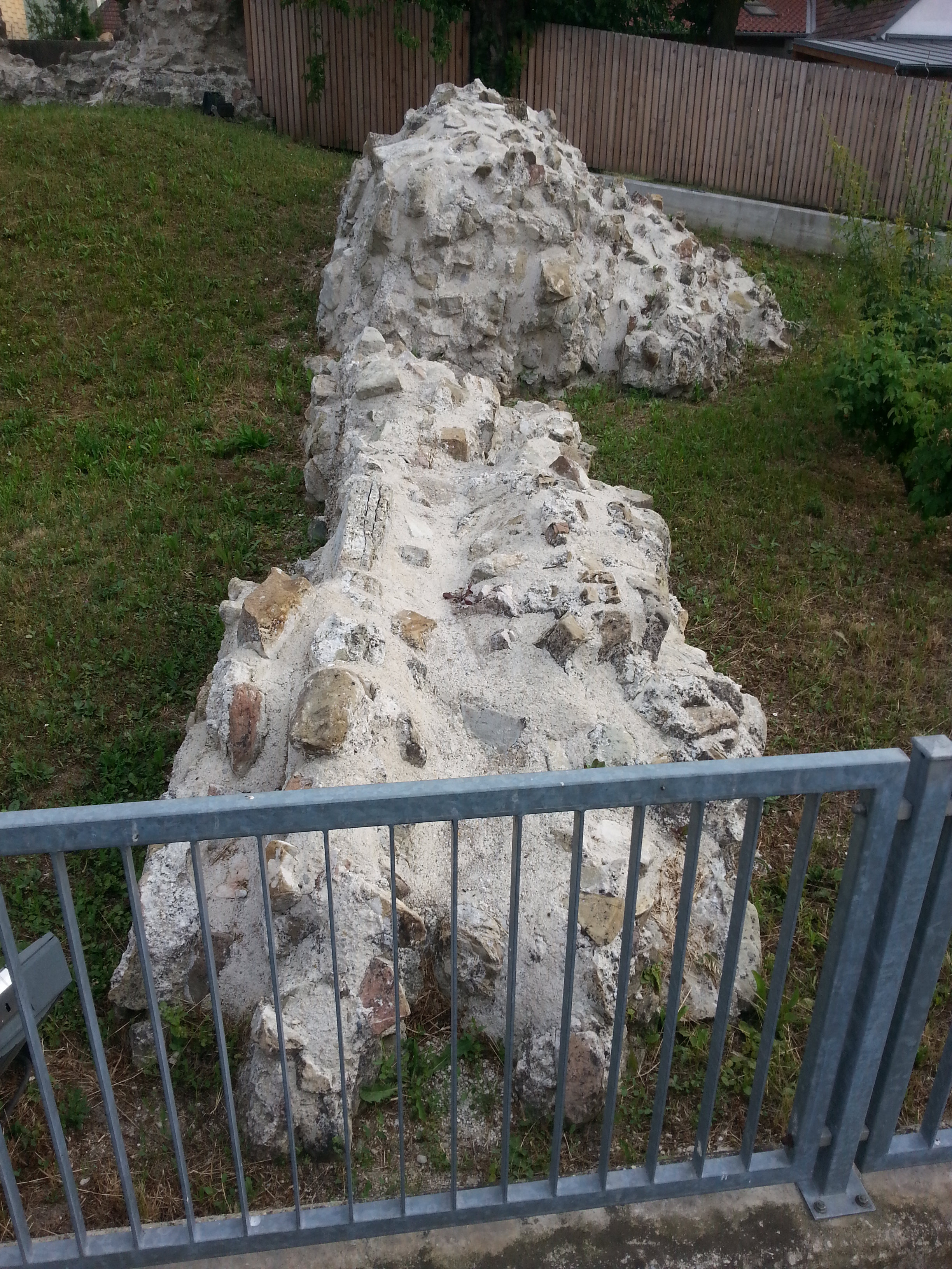 Burgus Zeiselmauer, Niederösterreich, 2018, Bruchsteinkonglomerat der umgestürzten Westmauer.